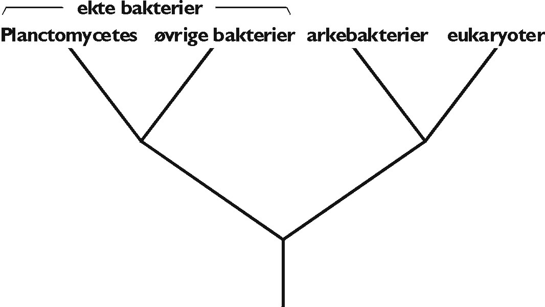 De første grenene i livets tre utgjøres av bakterier, arkebakterier og eukaryoter.